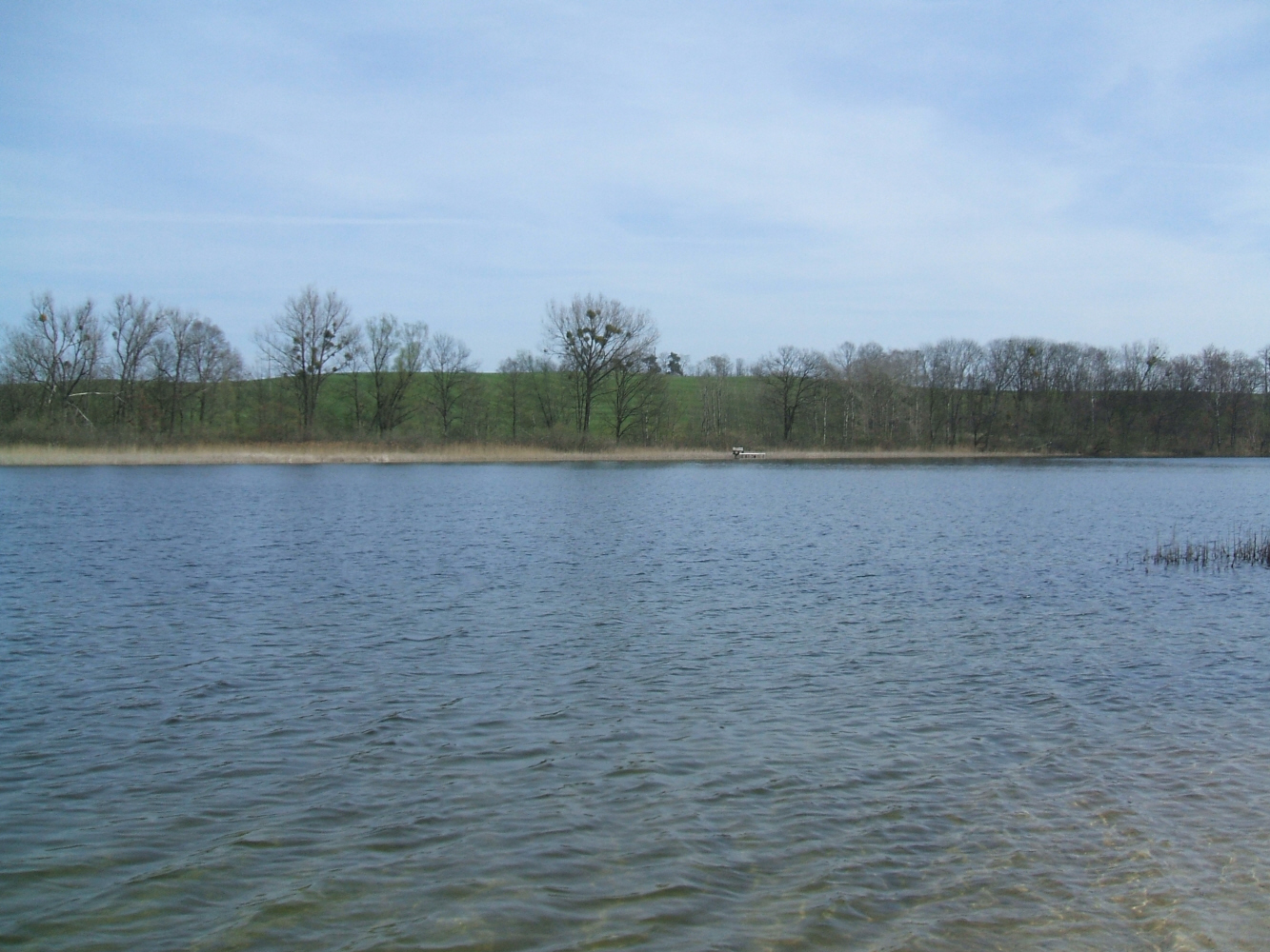 Zieskensee (Ziese) bei Puchow, Landkreis Müritz, Mecklenburg-Vorpommern